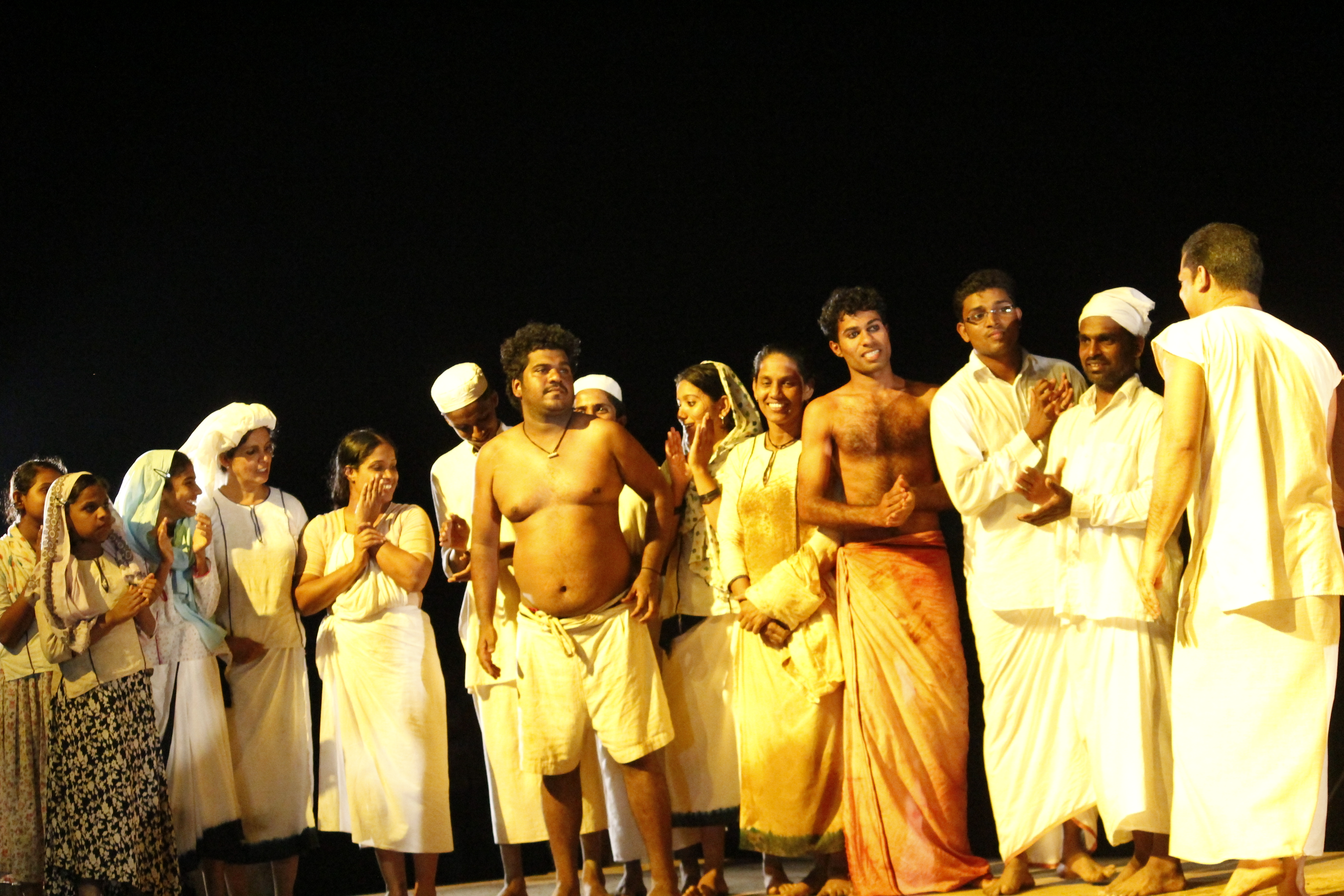 ഖസാക്കിന്റെ ഇതിഹാസം നാടകസംഘം